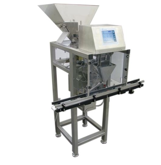 Beispiel für eine halbautomatische Abfüllwaage. Über das Transportband werden die zu befüllenden Gebinde unter den Auslauftrichter gebracht. Nach erfolgreicher Abfüllung wird das Gebinde weiter transportiert und entweder an eine nachgeschaltete Maschine übergeben (z.B. Verschließer) oder auf einem Sammeldrehteller zwischengeparkt.